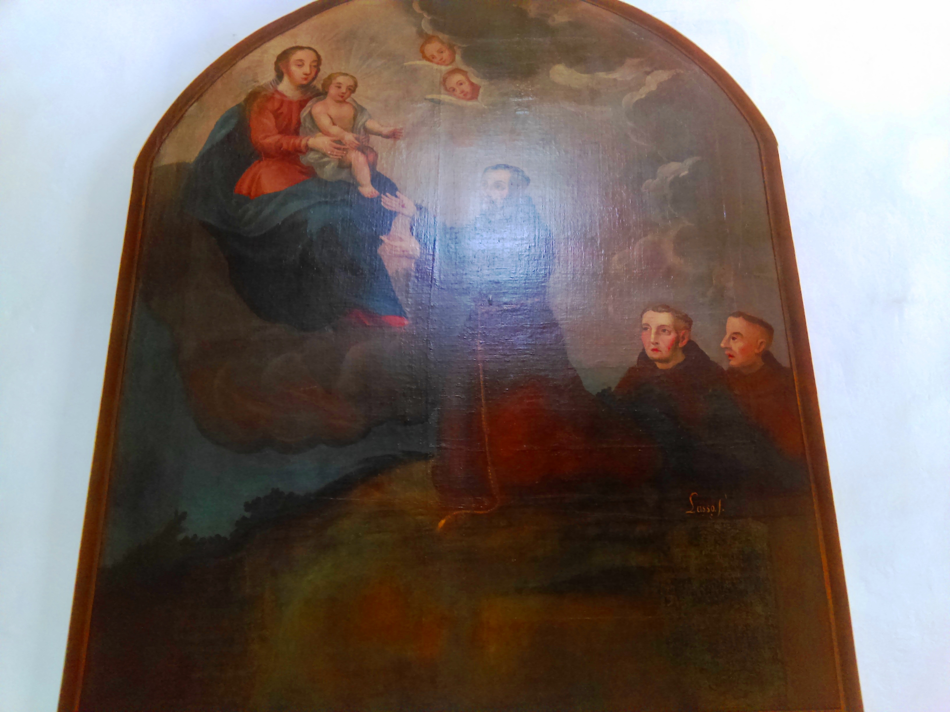 Capilla de Nuestra Señora de la Luz en Pachuca, México